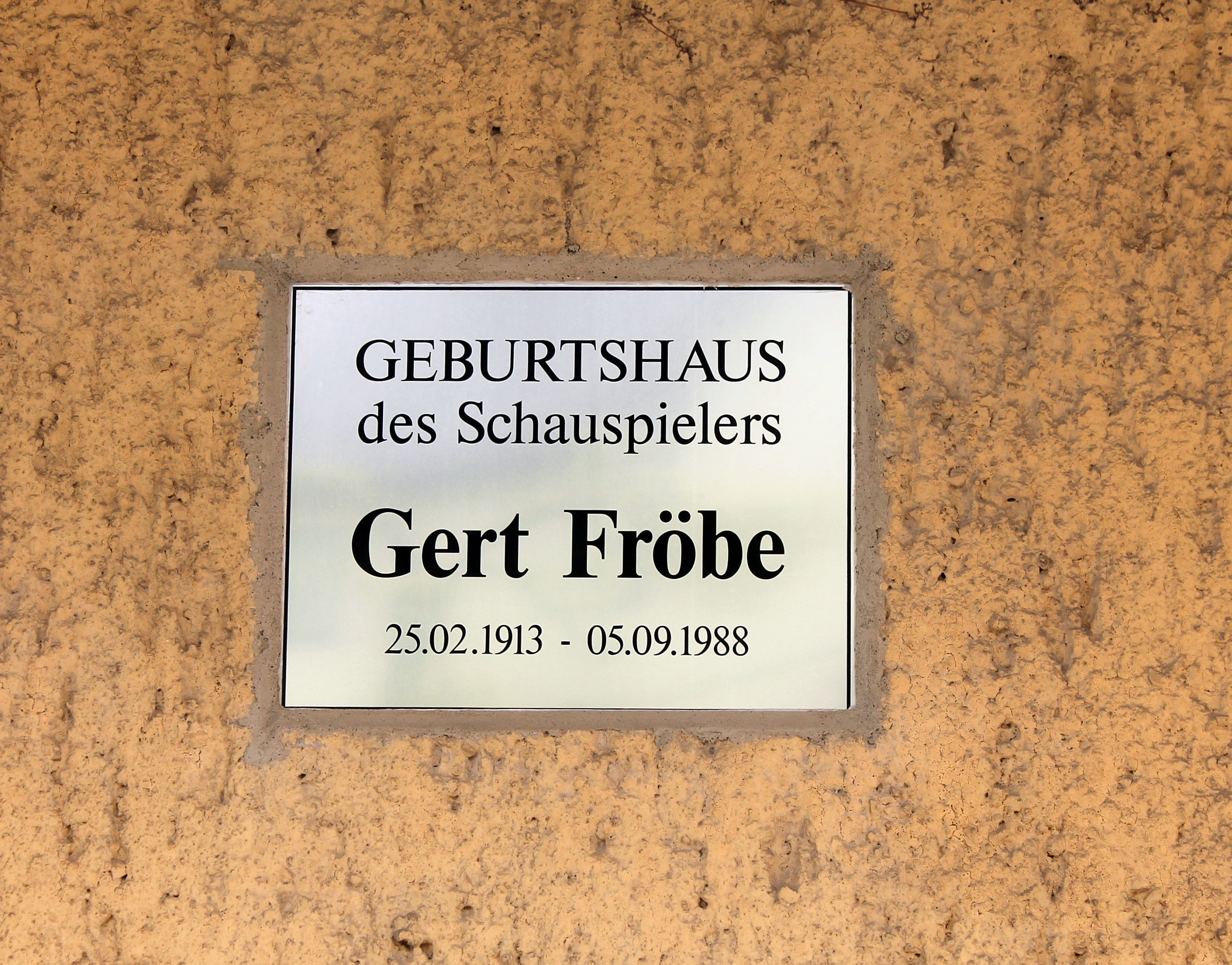 Gedenktafel am Geburtshaus des Schauspielers Gert Fröbe in Oberplanitz. Zwickau, Sachsen, Deutschland.